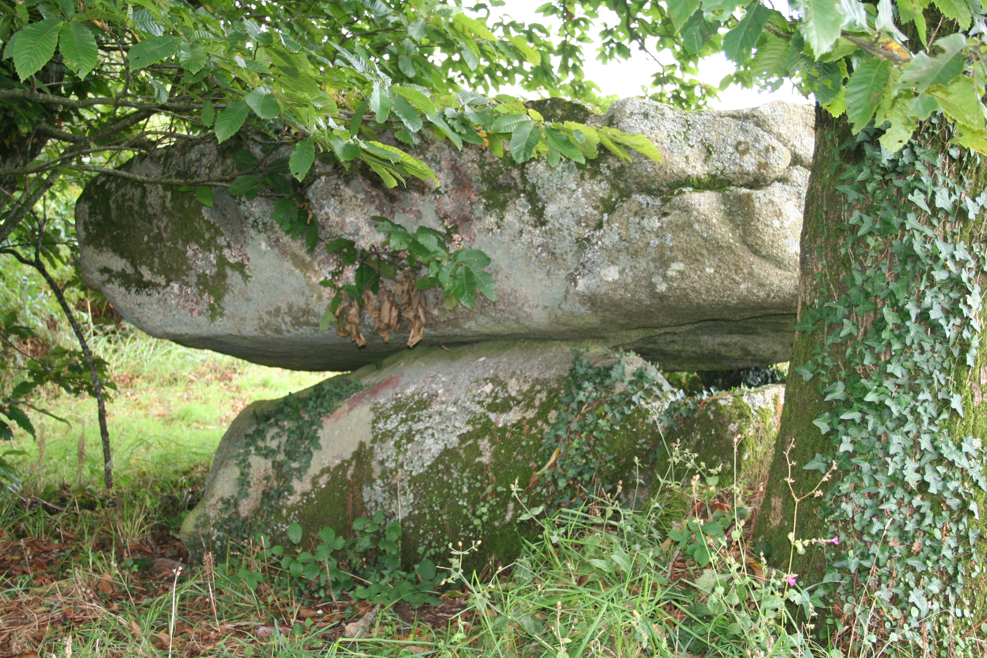 dolmen near Plouray - France